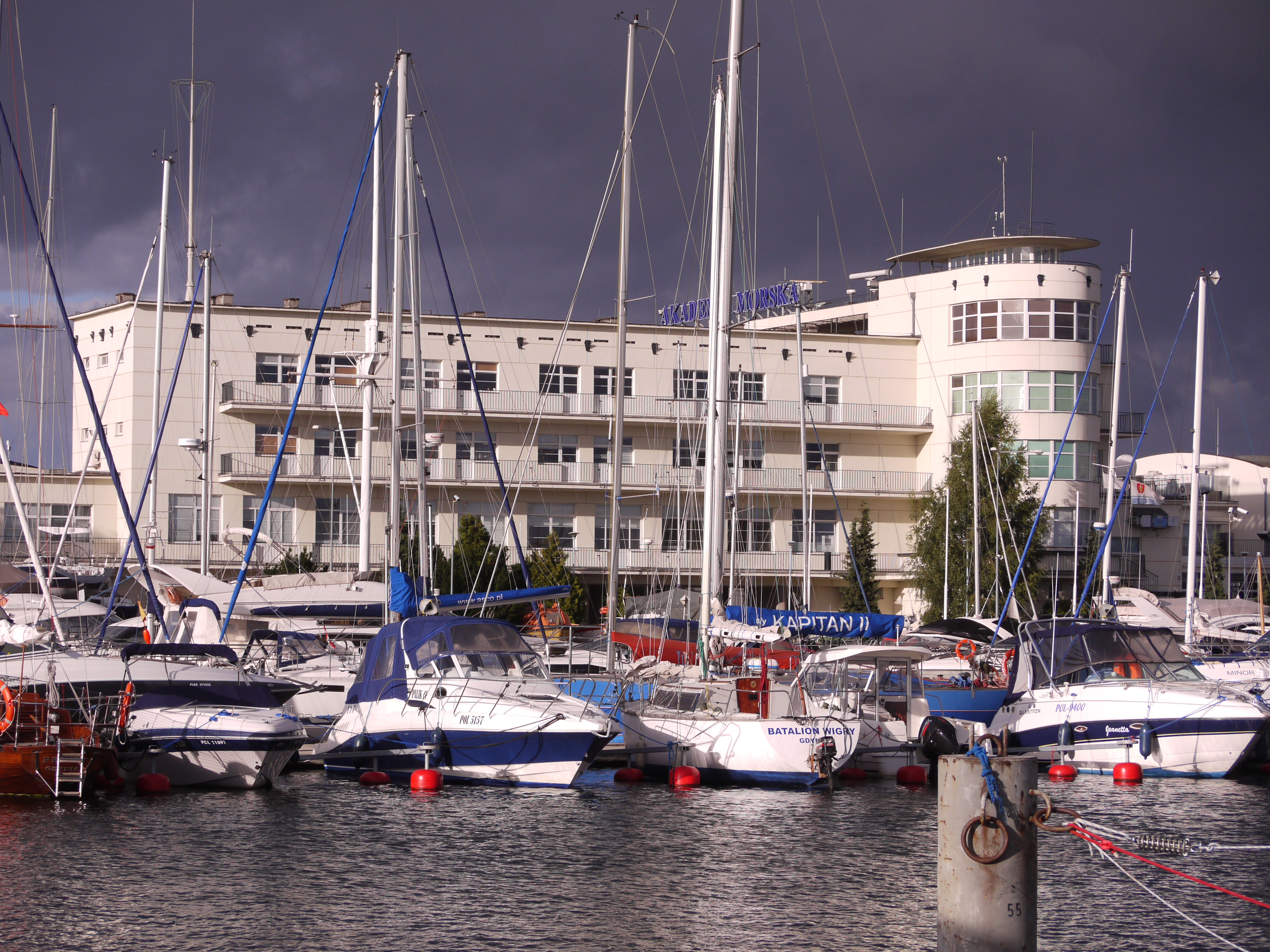 Dom Żeglarza Polskiego (obecnie Akademia Morska) Aleja Jana Pawła II 3, Gdynia. Zabytek modernizmu z 1937 r.